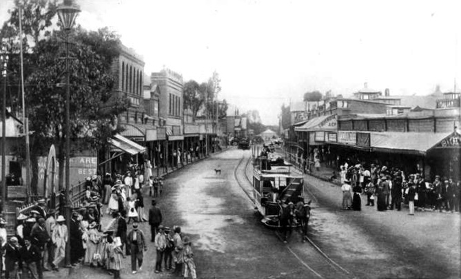 Centre de Kimberley vers 1905 (Du Toitspan Road) Sujet : Kimberley (SA) Photo publiée en 1905